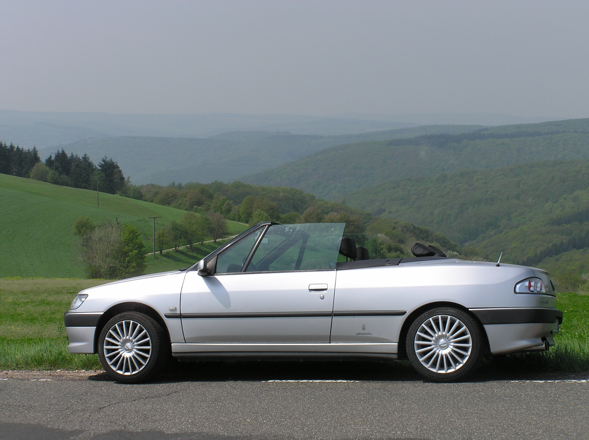 Peugeot 306 Cab 2000